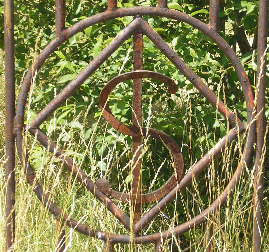 Das Logo des ehem. Glaswerks "Sophienhütte" im Werkstor in Ilmenau (Thüringen).